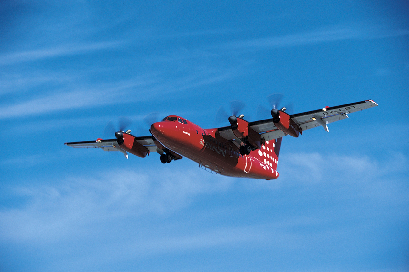 Greenland29